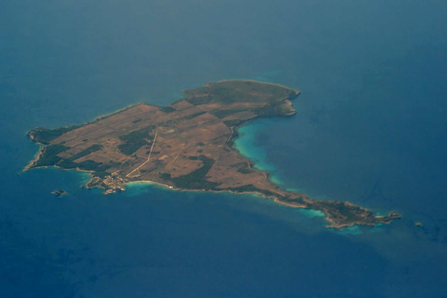 Vue aérienne de l'ile de Pianosa, dans l'archipel Toscan en Italie